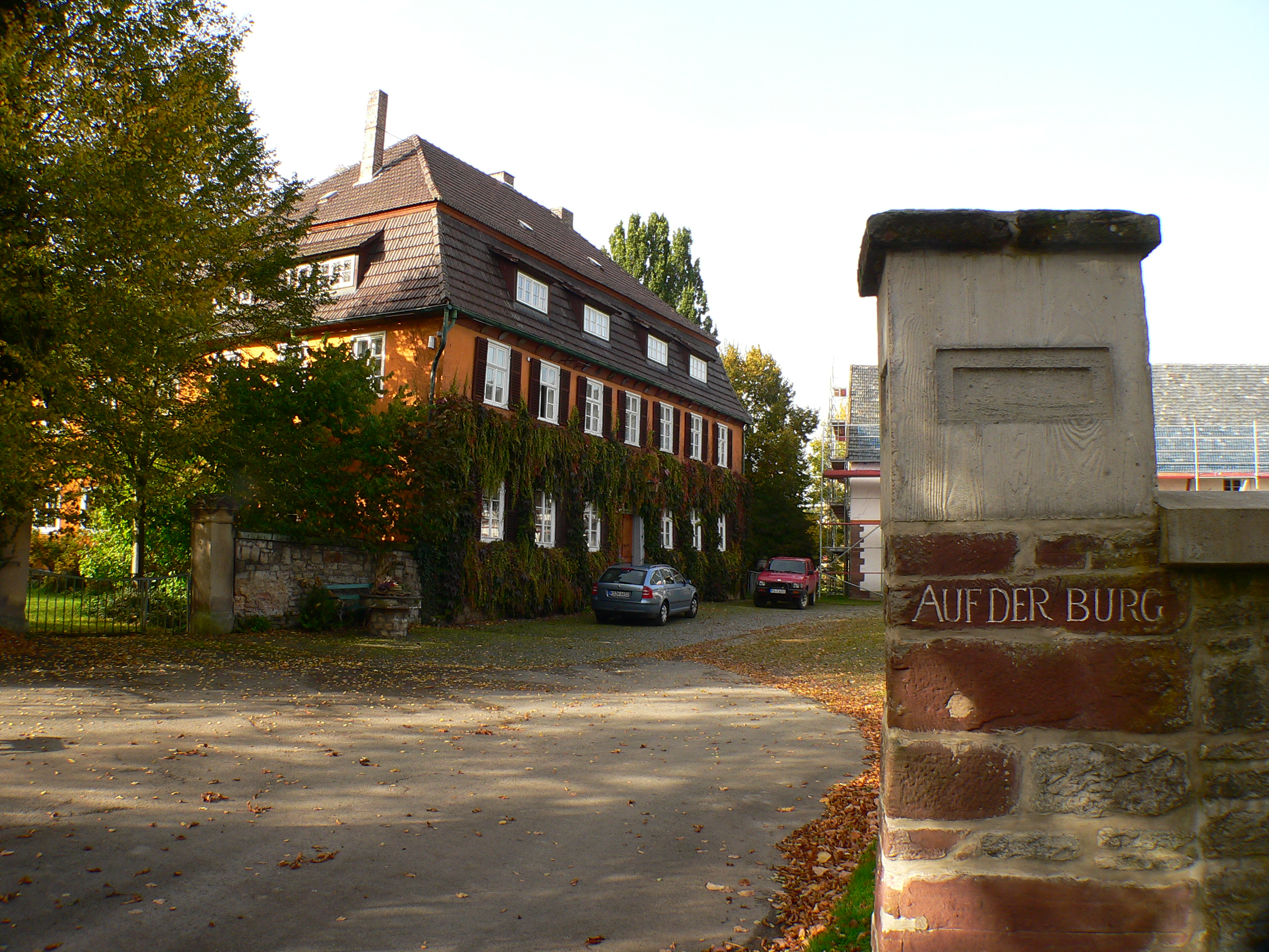 Herrenhaus Burg Liebenau in Liebenau im Landkreis Kassel, Hessen, Deutschland